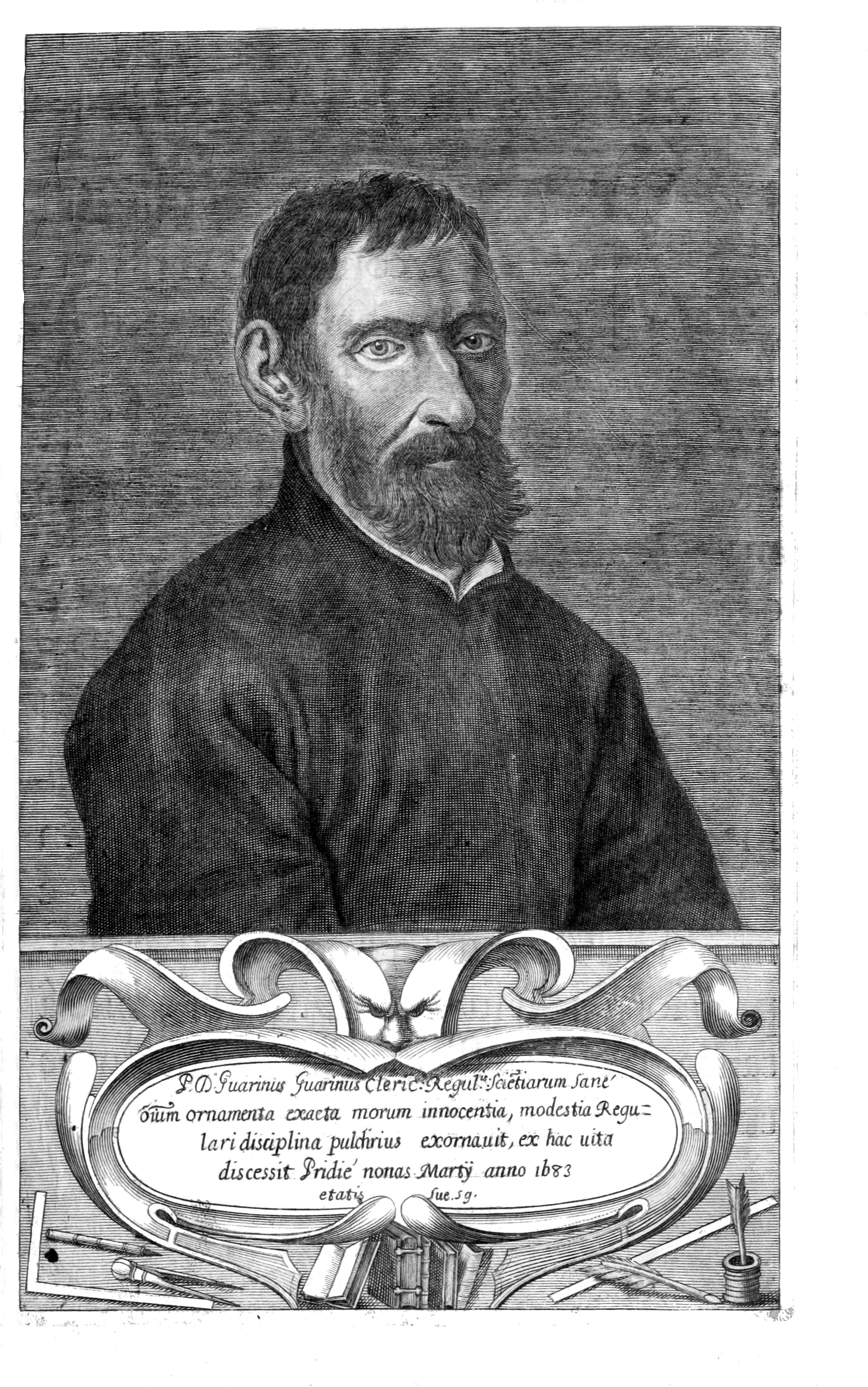 Ritratto calcografico